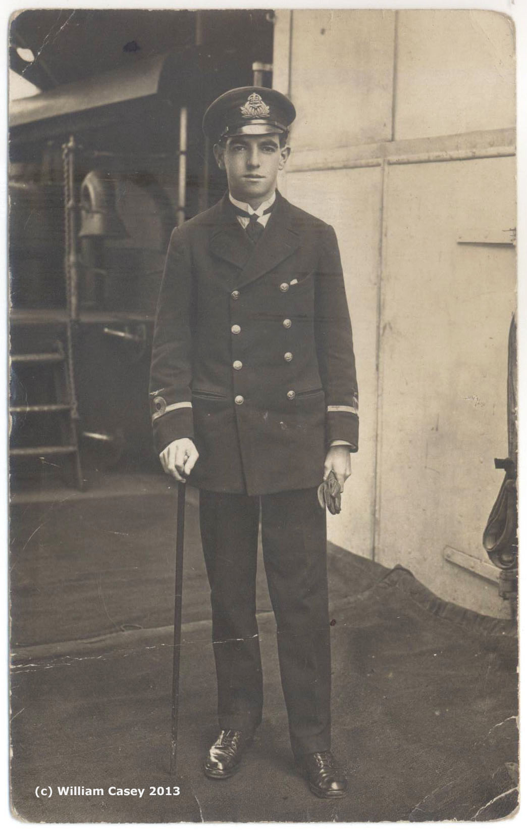 Yeulett på HMS Furious 1918